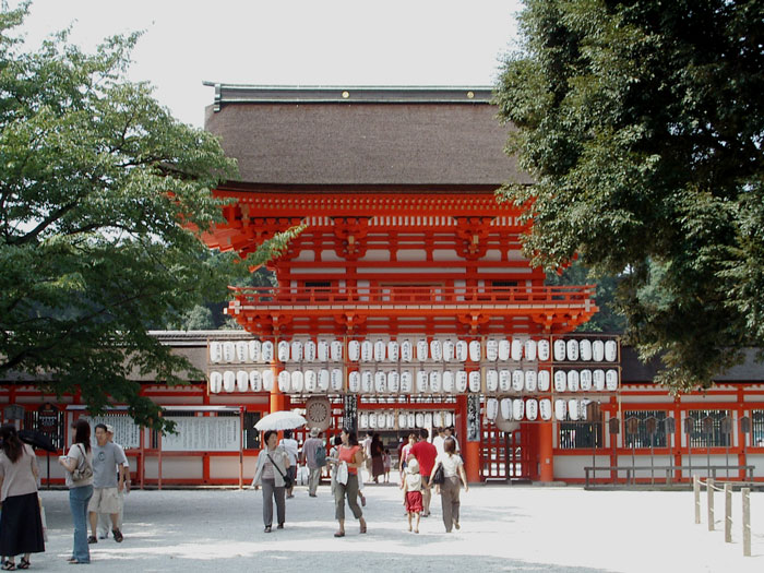 Shimogamo shrine, Kyoto